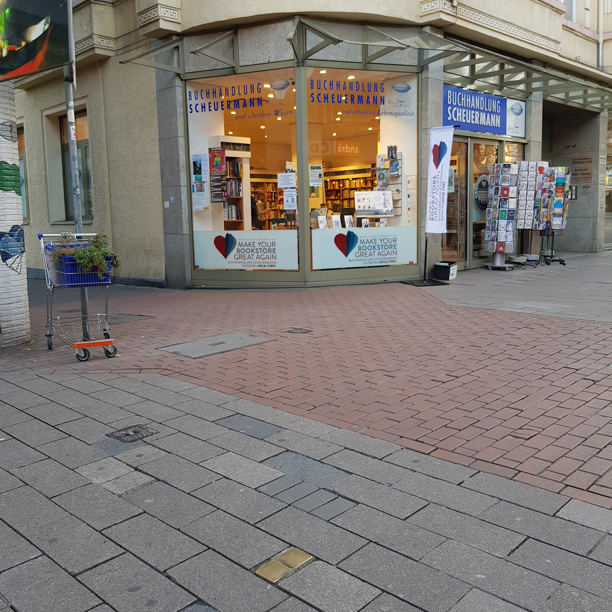 Stolpersteine für Jenny Landau, geb. Herz, Jg. 1894, und Oskar Landau, Jg. 1881, geflüchtet 1939 nach Belgien, interniert in Machelen, 1942 deportiert, ermordet im Vernichtungslager Auschwitz